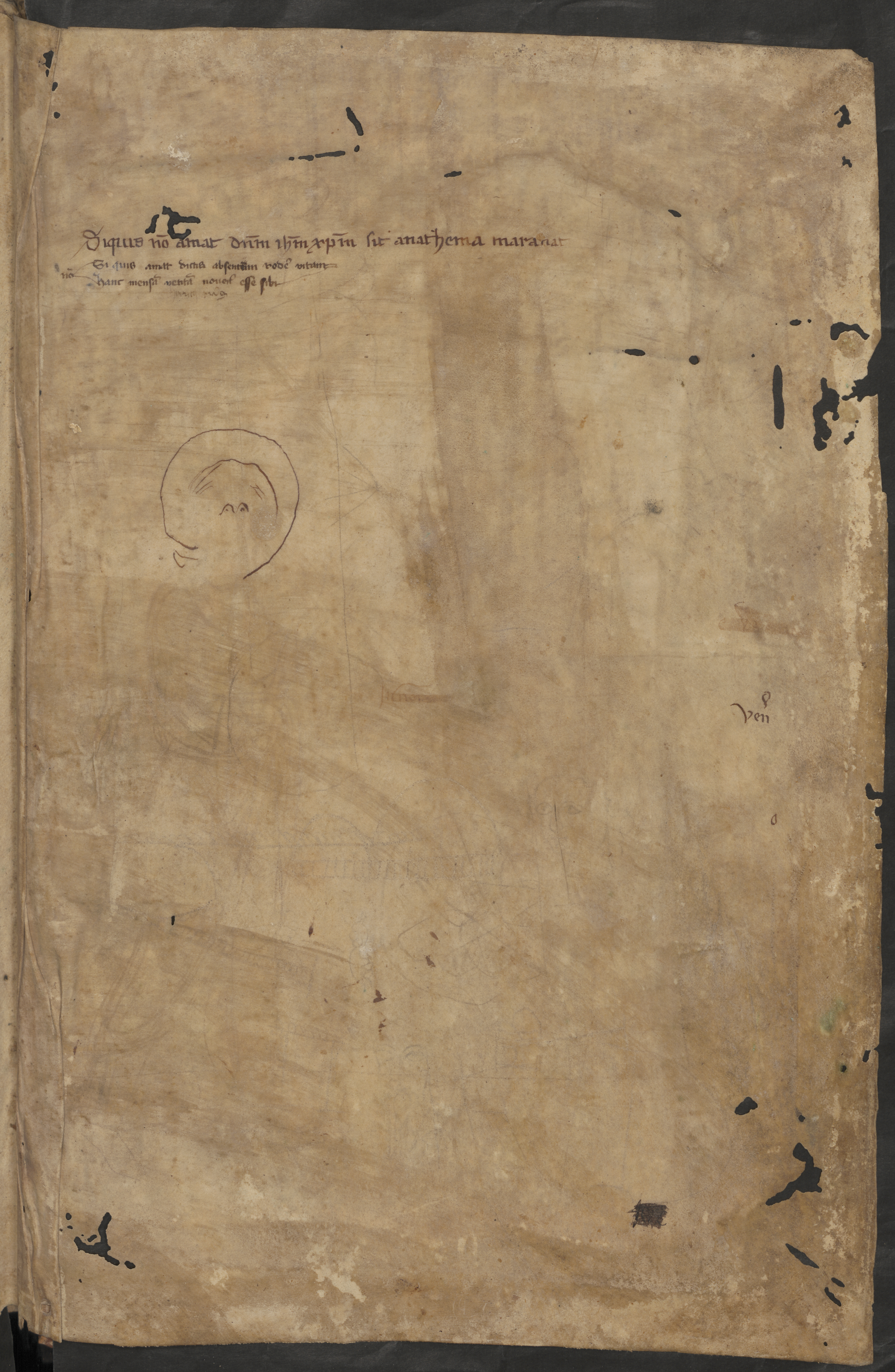 Hs.202, laatste schutblad